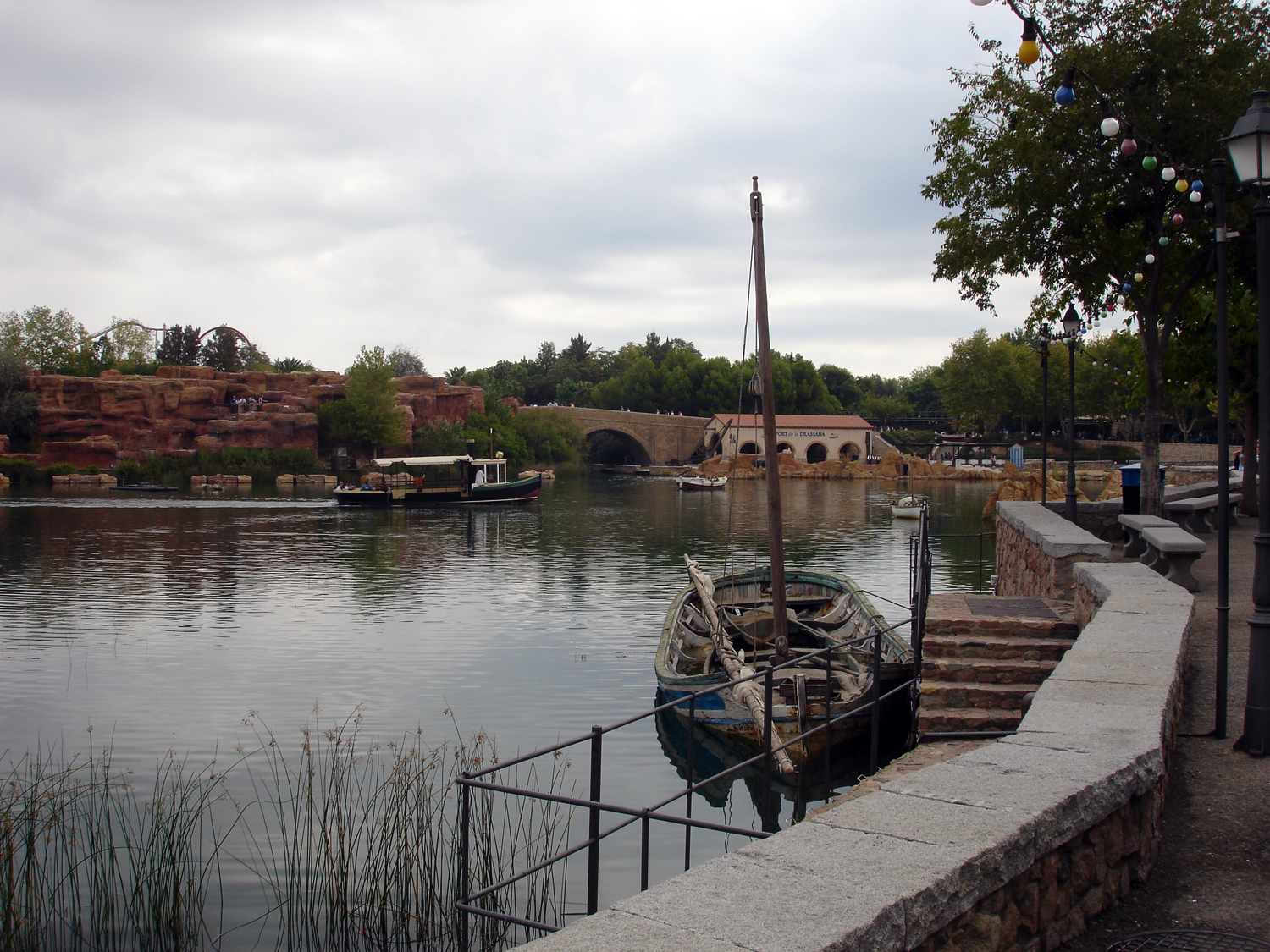 Port Aventura - Zona mediterránea (puerto)